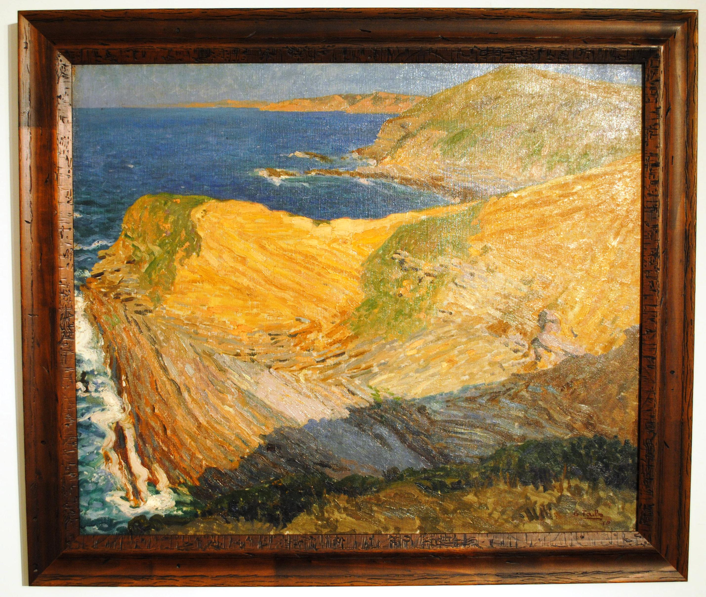 Vexa o título e as categorías.